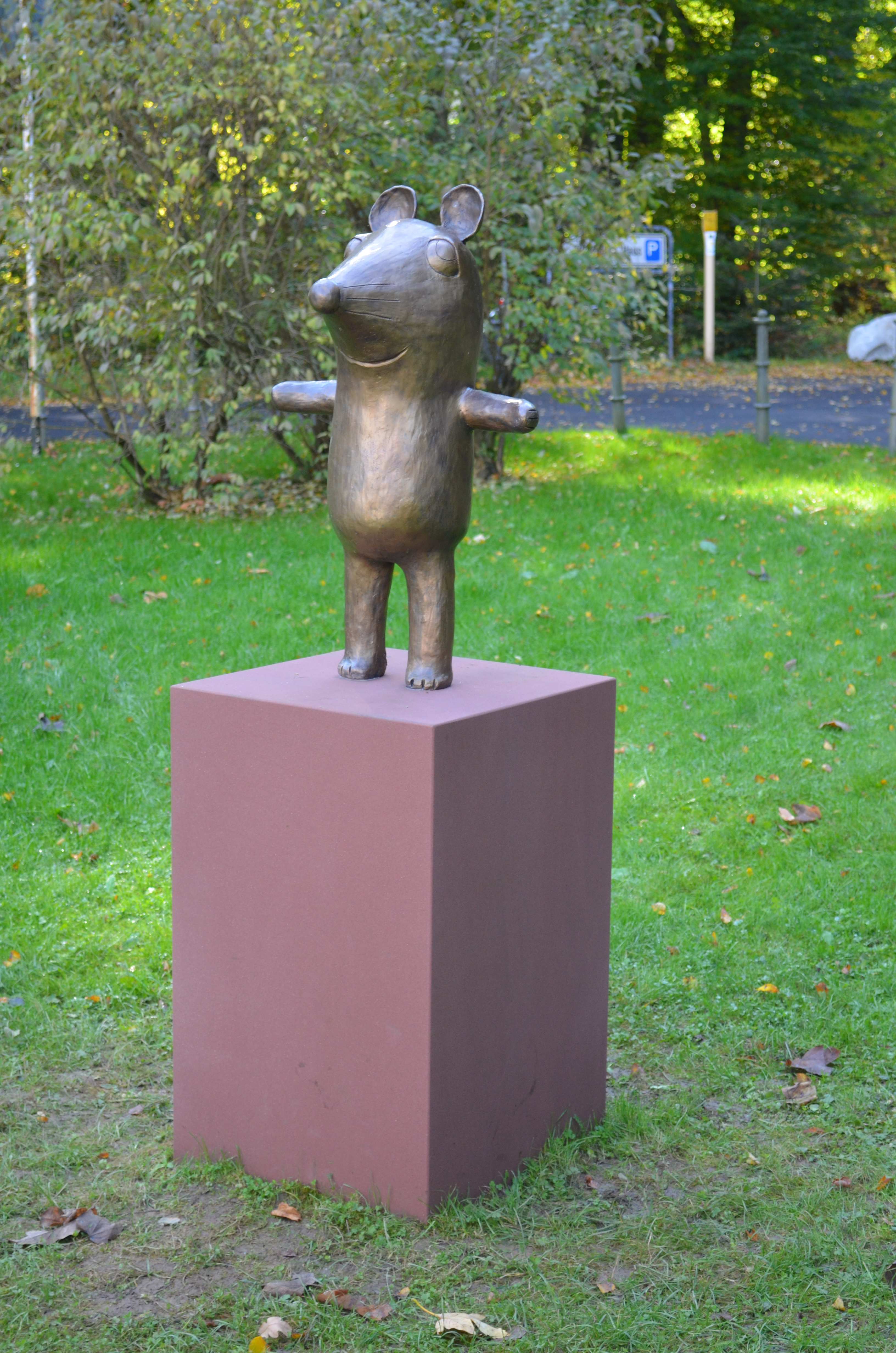 Bad Homburg, Gotisches Haus, Denkmal, die Maus